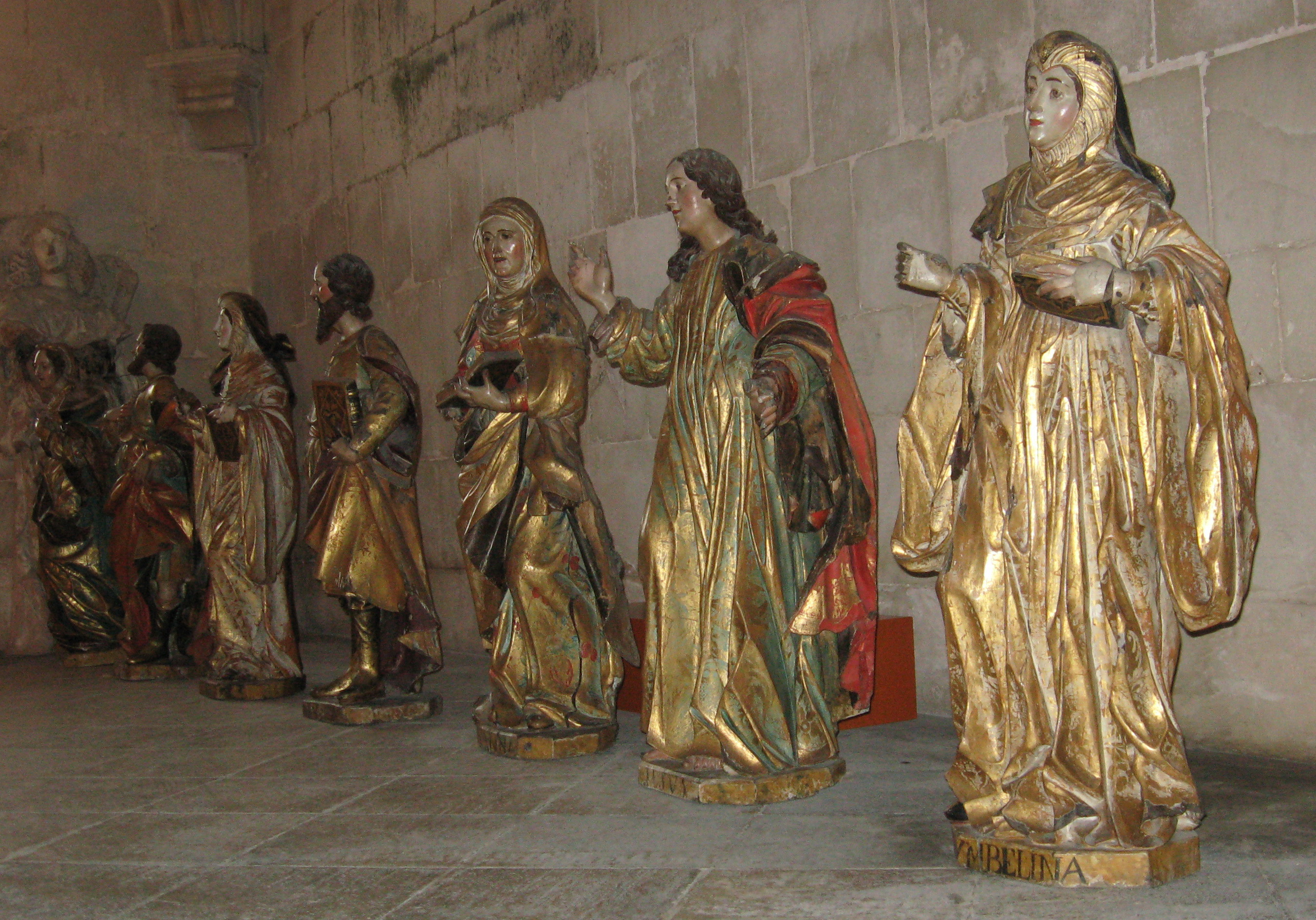 Mosteiro de Alcobaça, altarpieces, School of Alcobaça, 18th century